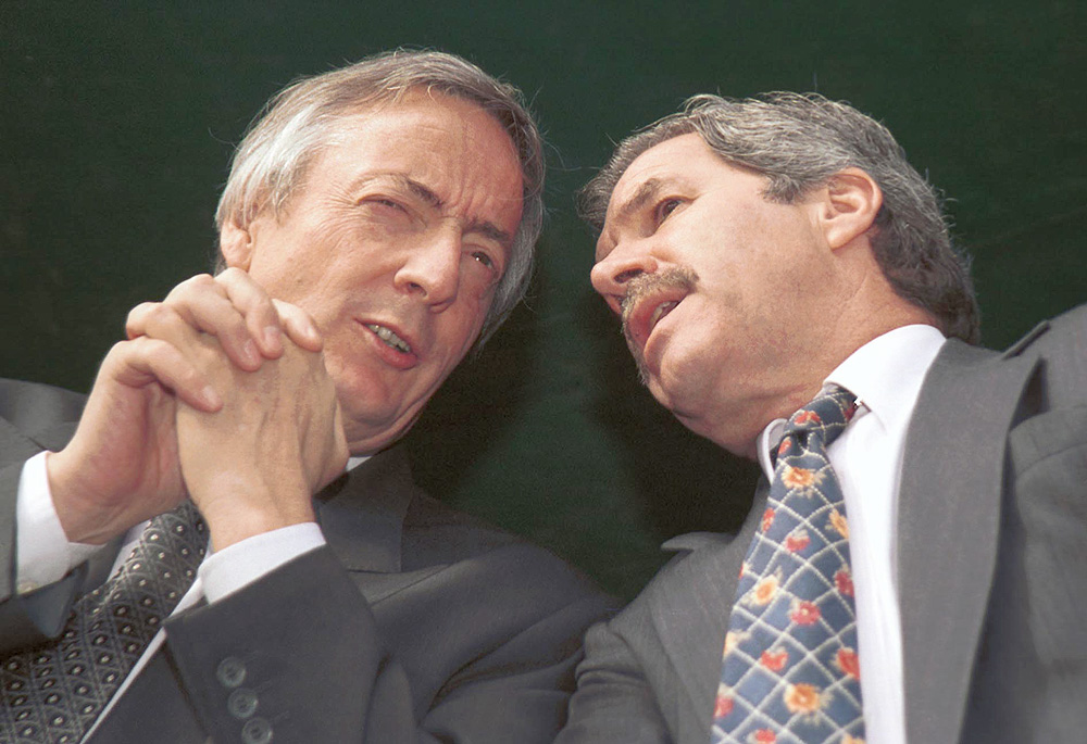 Bs.As. Ensenada - El presidente Néstor Kirchner junto al gobernador de la provincia de Buenos Aires, Felipe Solá.